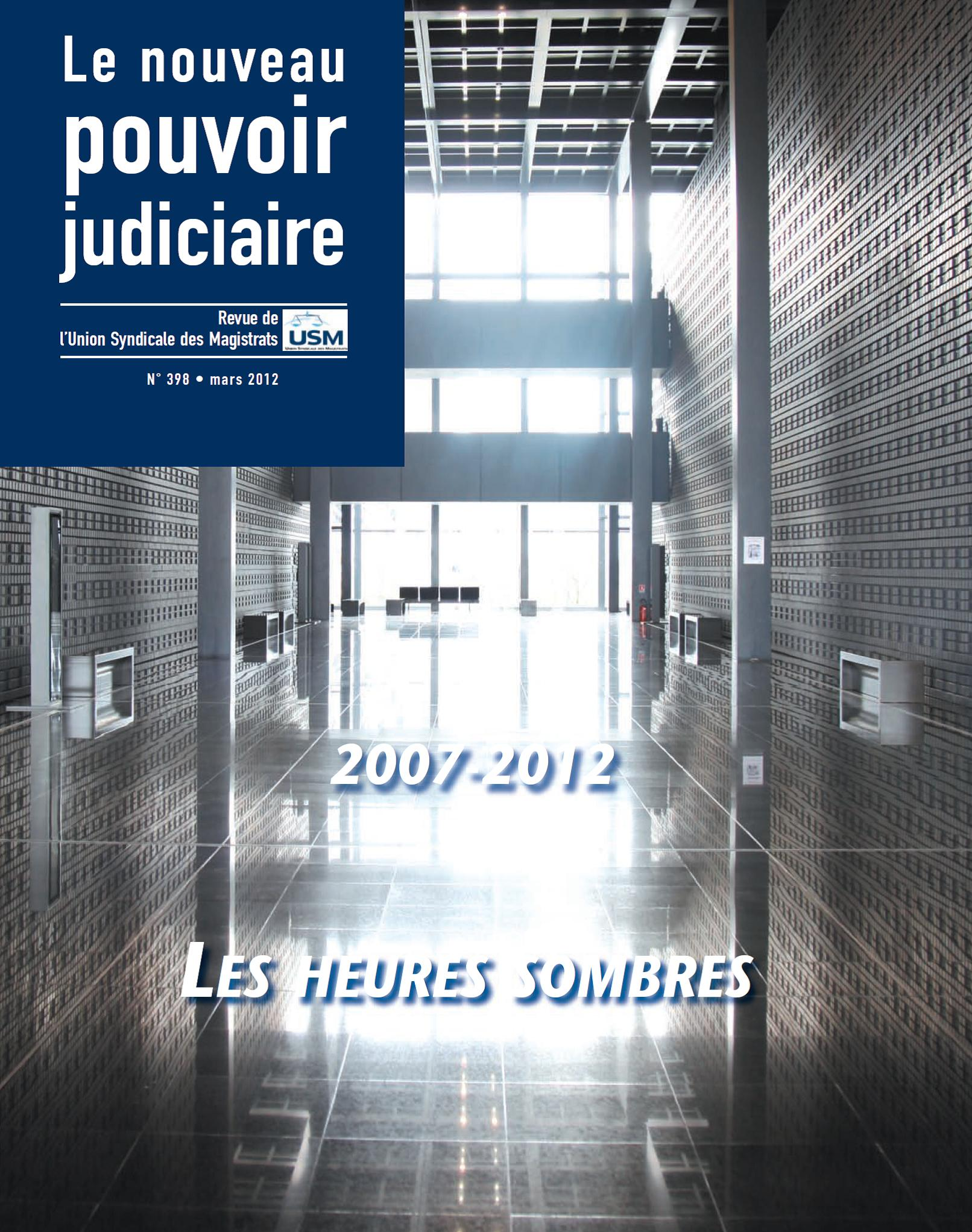 Couverture du numéro 398 (mars 2012) de la revue de l'Union syndicale des magistrats (USM), Le nouveau pouvoir judiciaire (NPJ).